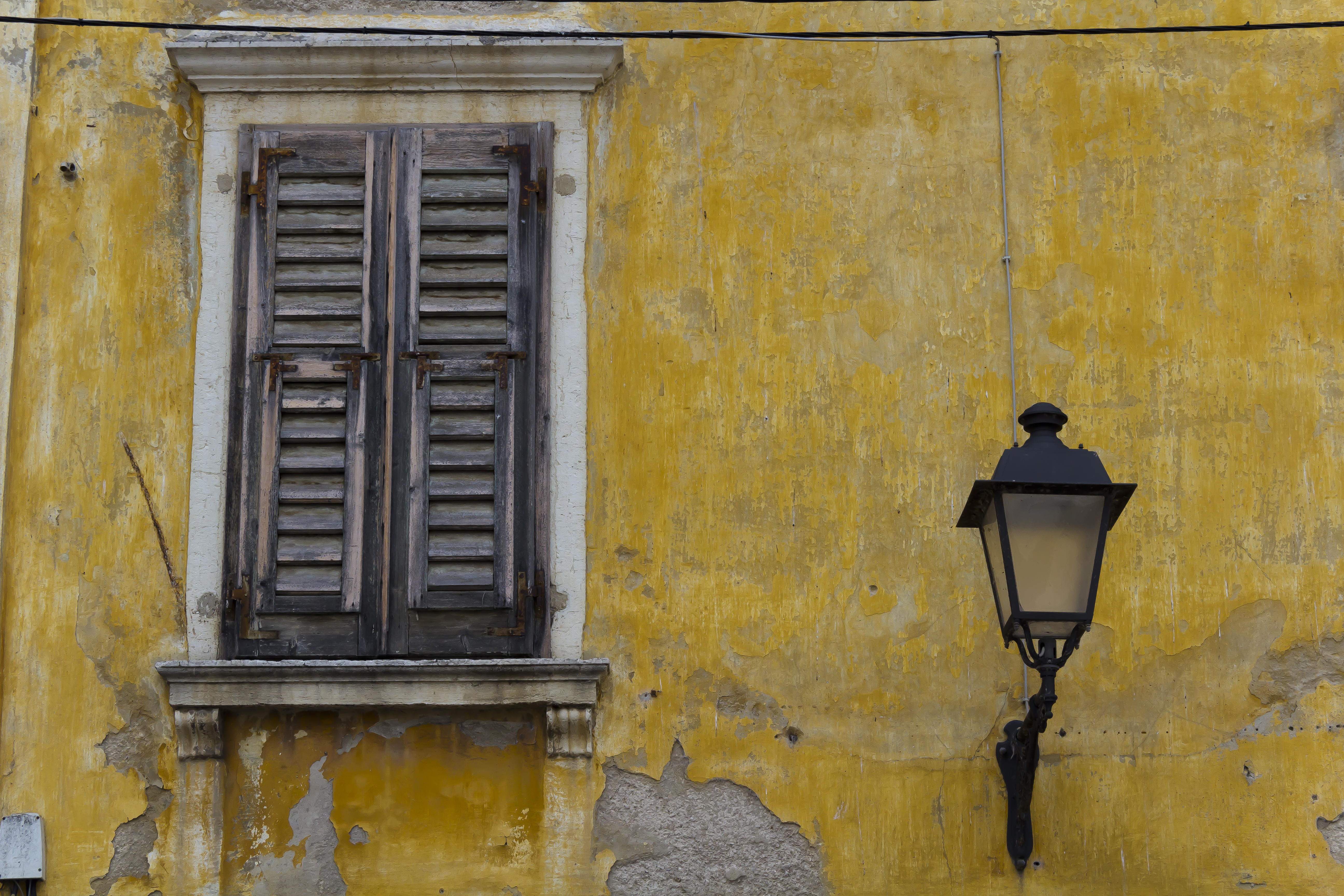 Piran, Slovenia.